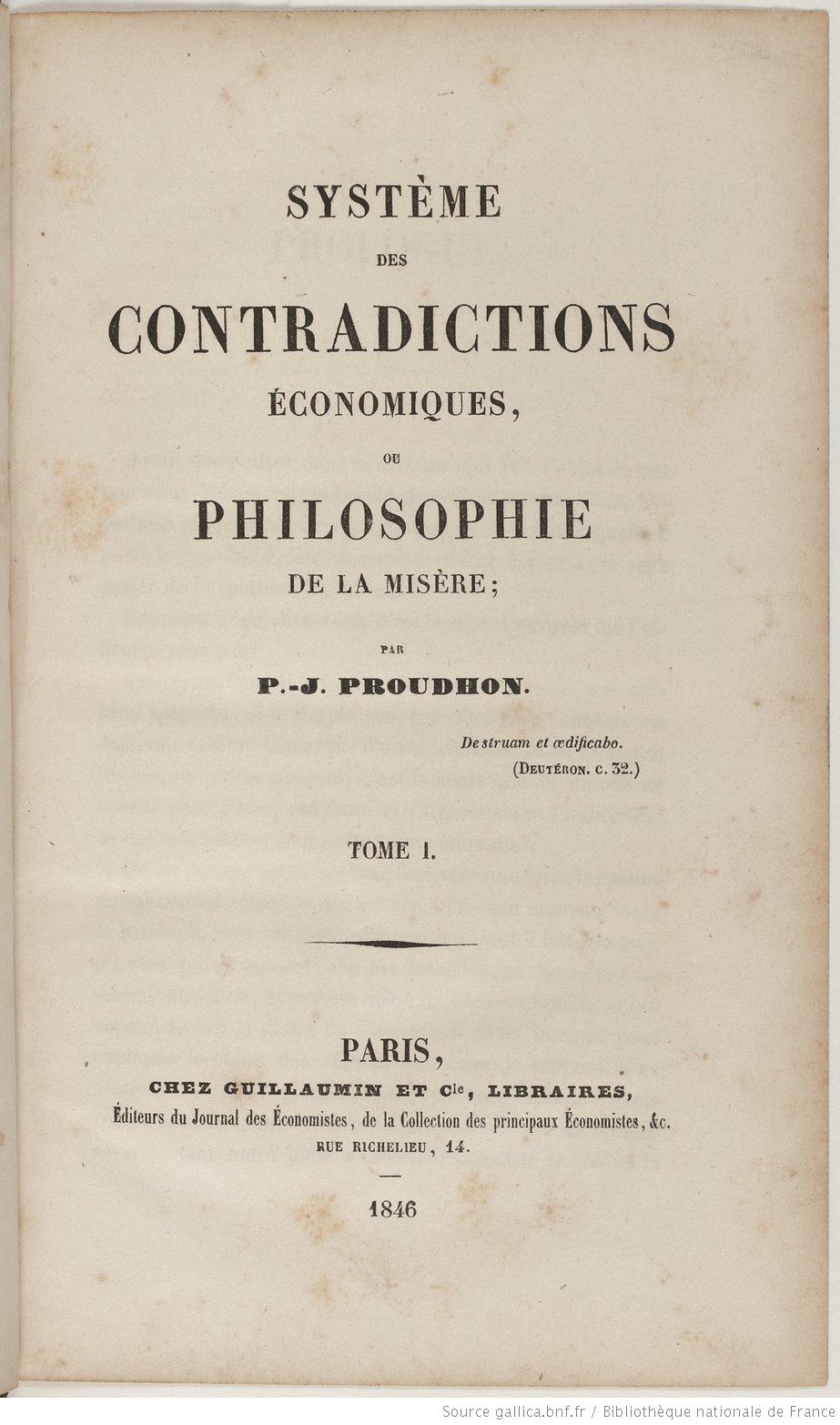 Pierre-Joseph Proudhon - Système des contradictions économiques ou Philosophie de la misère, 1846.